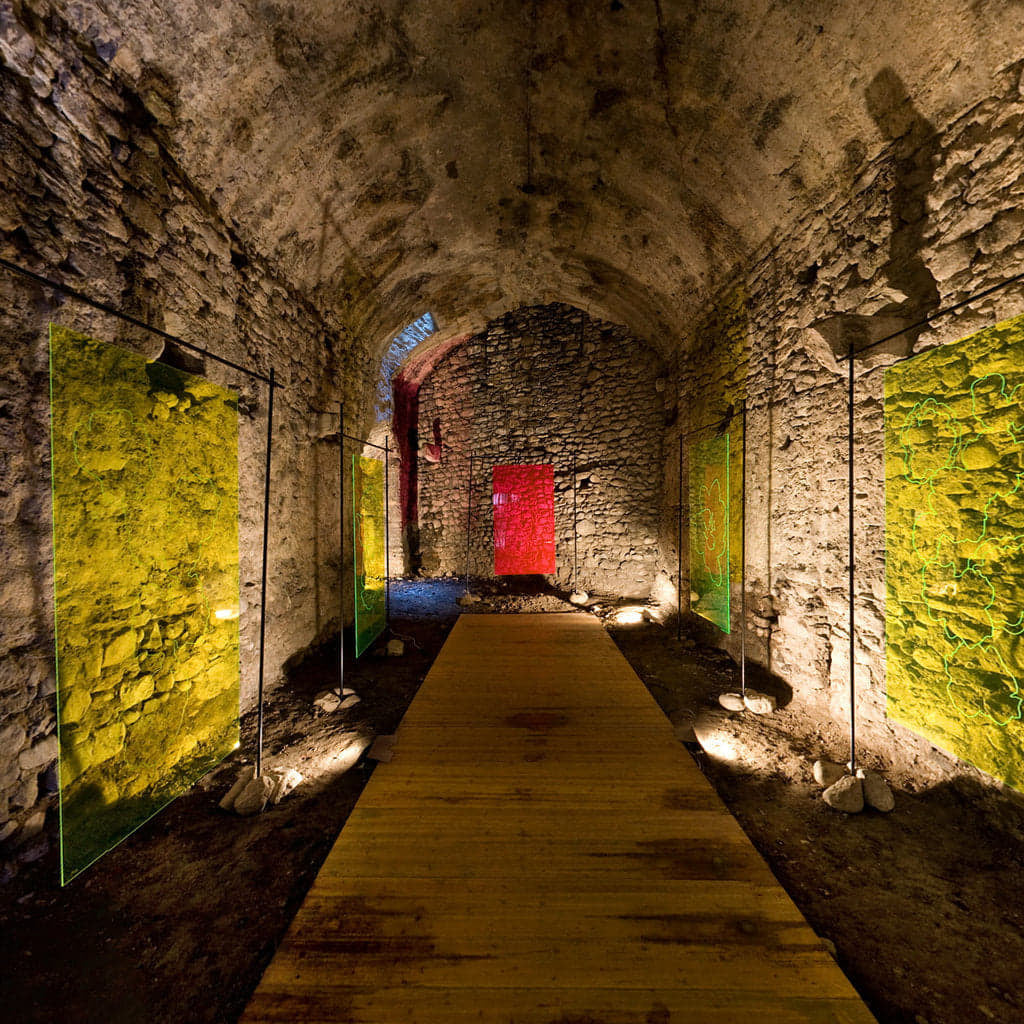 rivellino (interno) durante un'esposizione d'arte